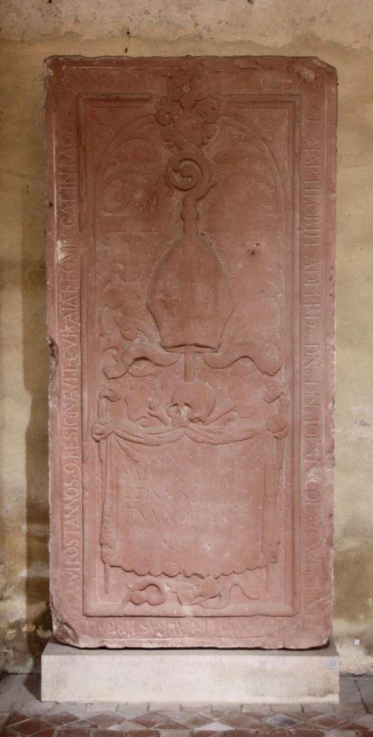 Kloster Eberbach Basilika Grabplatte 22 Abt Johannes Nikolaus Weinbach.